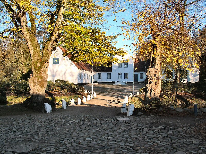 Bangsbo museum, hovedbygningen. Tidligere Bangsbo Hovedgård. Beliggenhed i det sydvestlige Frederikshavn.